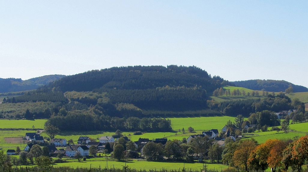 Menkhausen (Schmallenberg), Germany